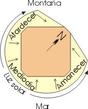 Luz solar de l'Eixample de Barcelona Dibujo realizado por: Josemanuel